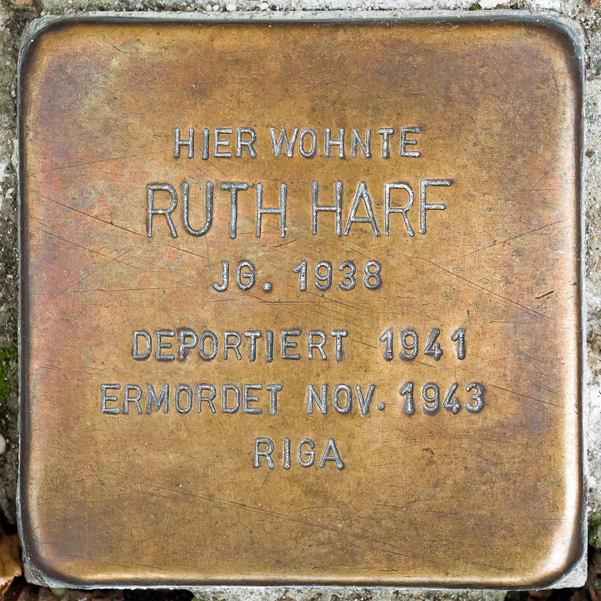 Stolperstein Harf, Ruth